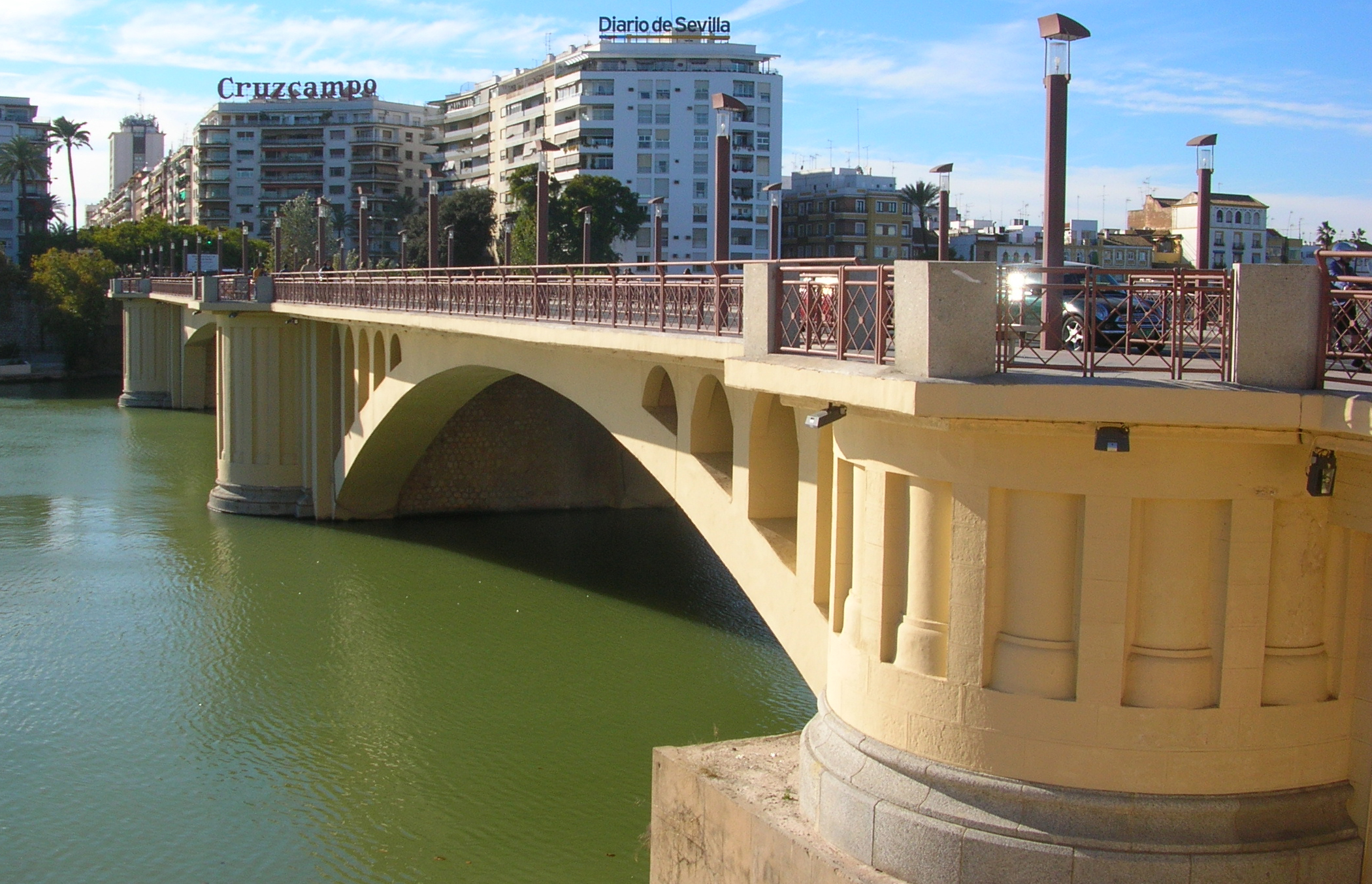 Pont de San Telmo (Séville). Puente de San Telmo